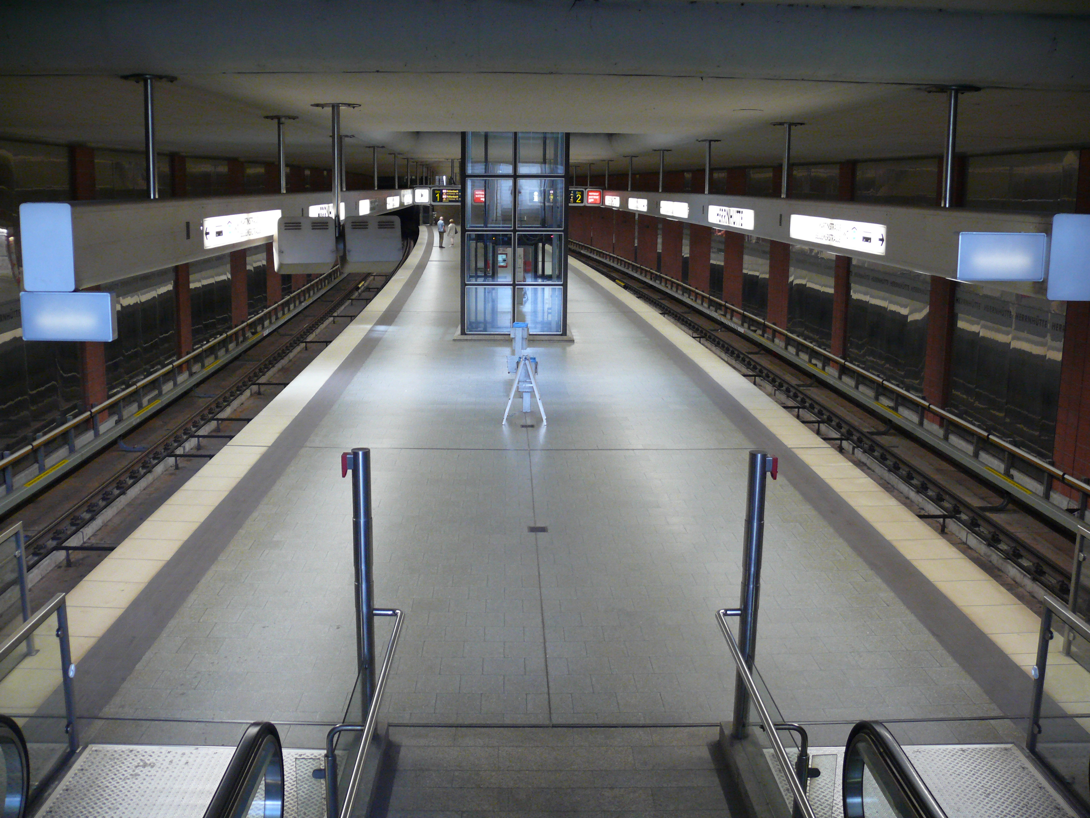 Blick auf die Bahnsteigebene am U-Bahnhof Herrnhütte in Nürnberg.